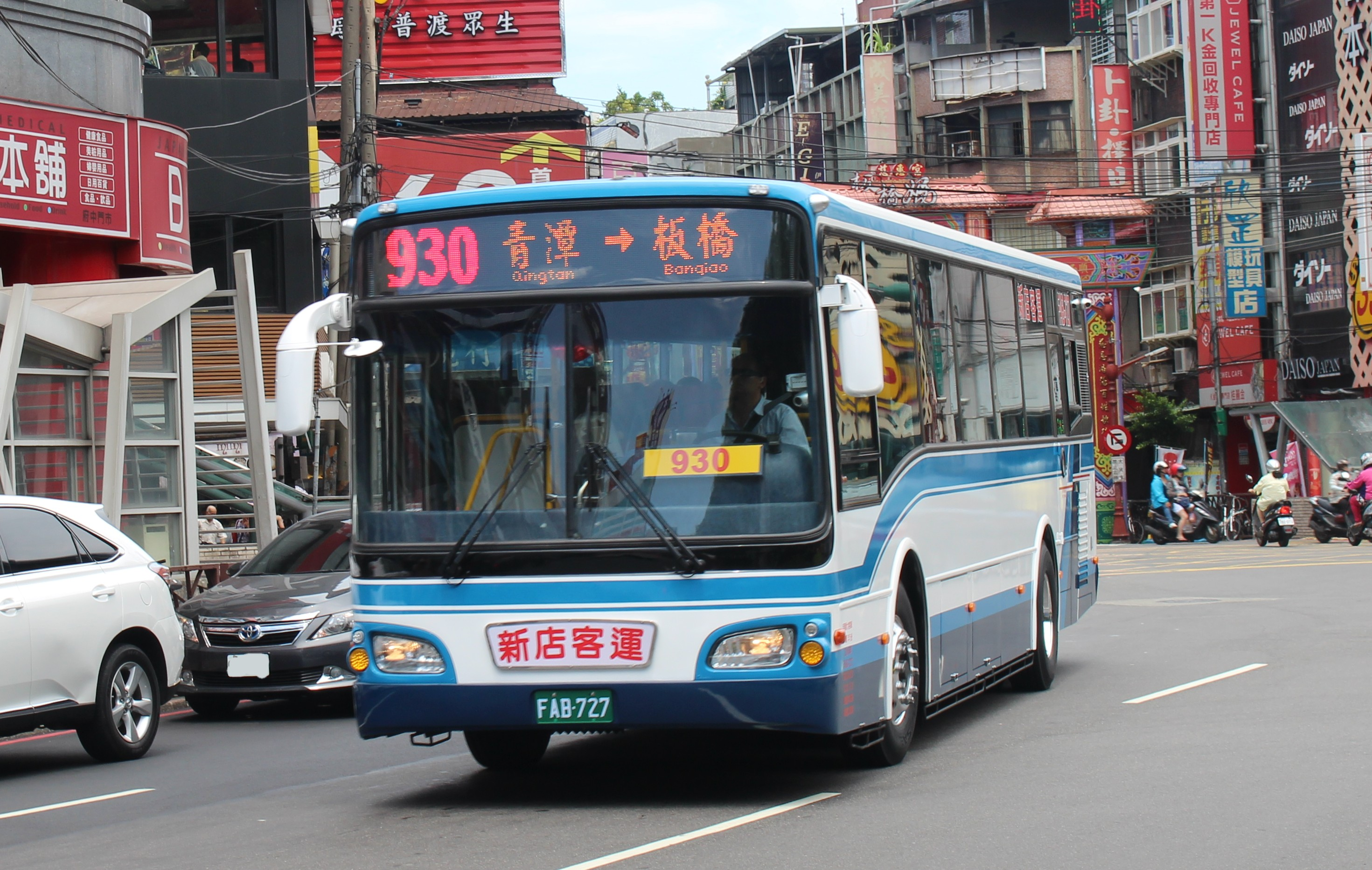 新店客運2016年新單門大車FAB-727